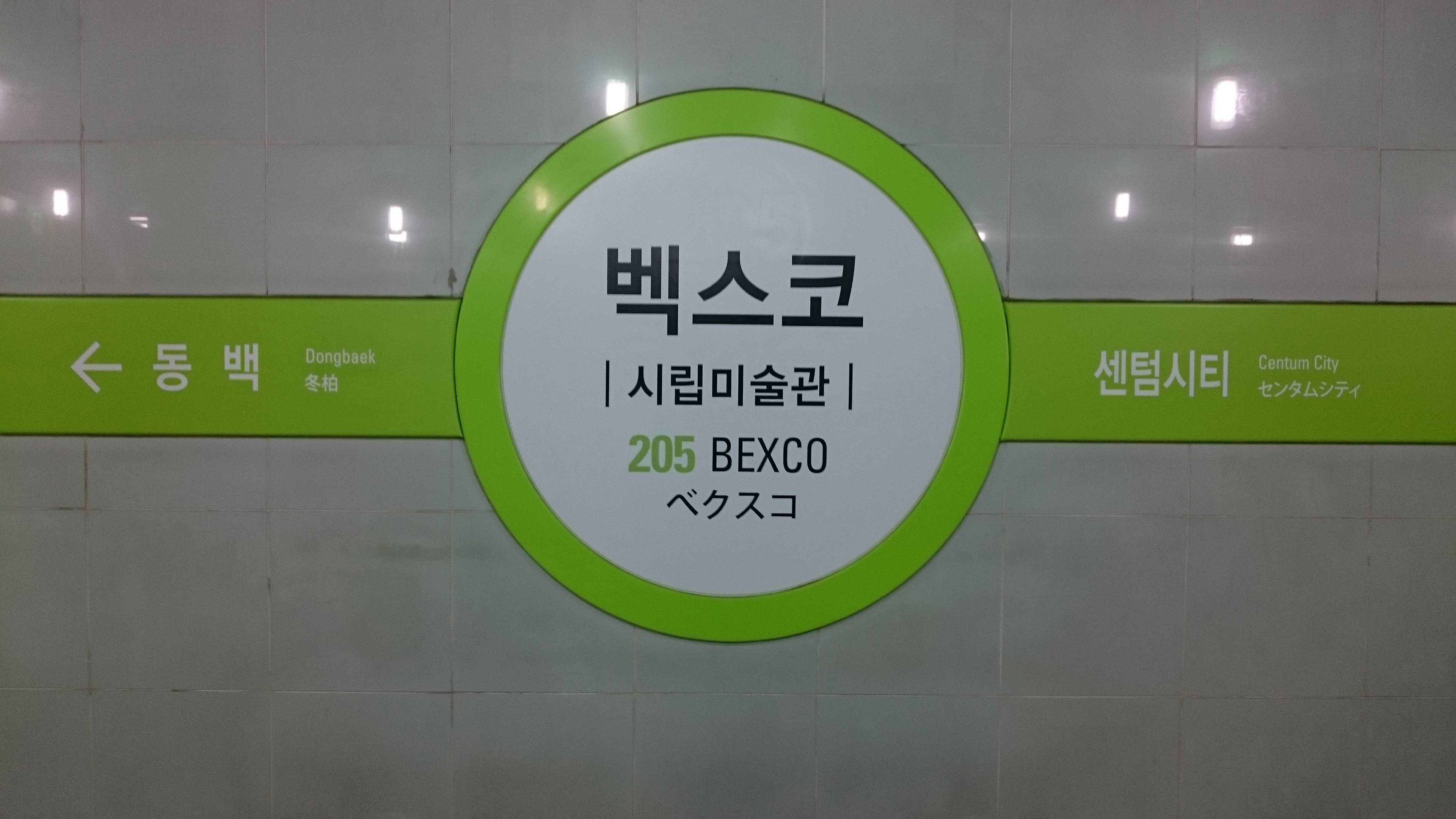 釜山都市鉄道2号線BEXCO駅駅名標